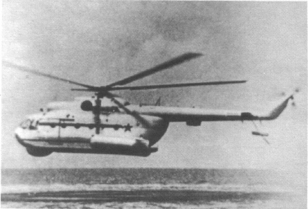 Prototyp W-14 w zawisie. W tylnej części kadłuba brak gondoli magnetometru. (opis oryginalny)